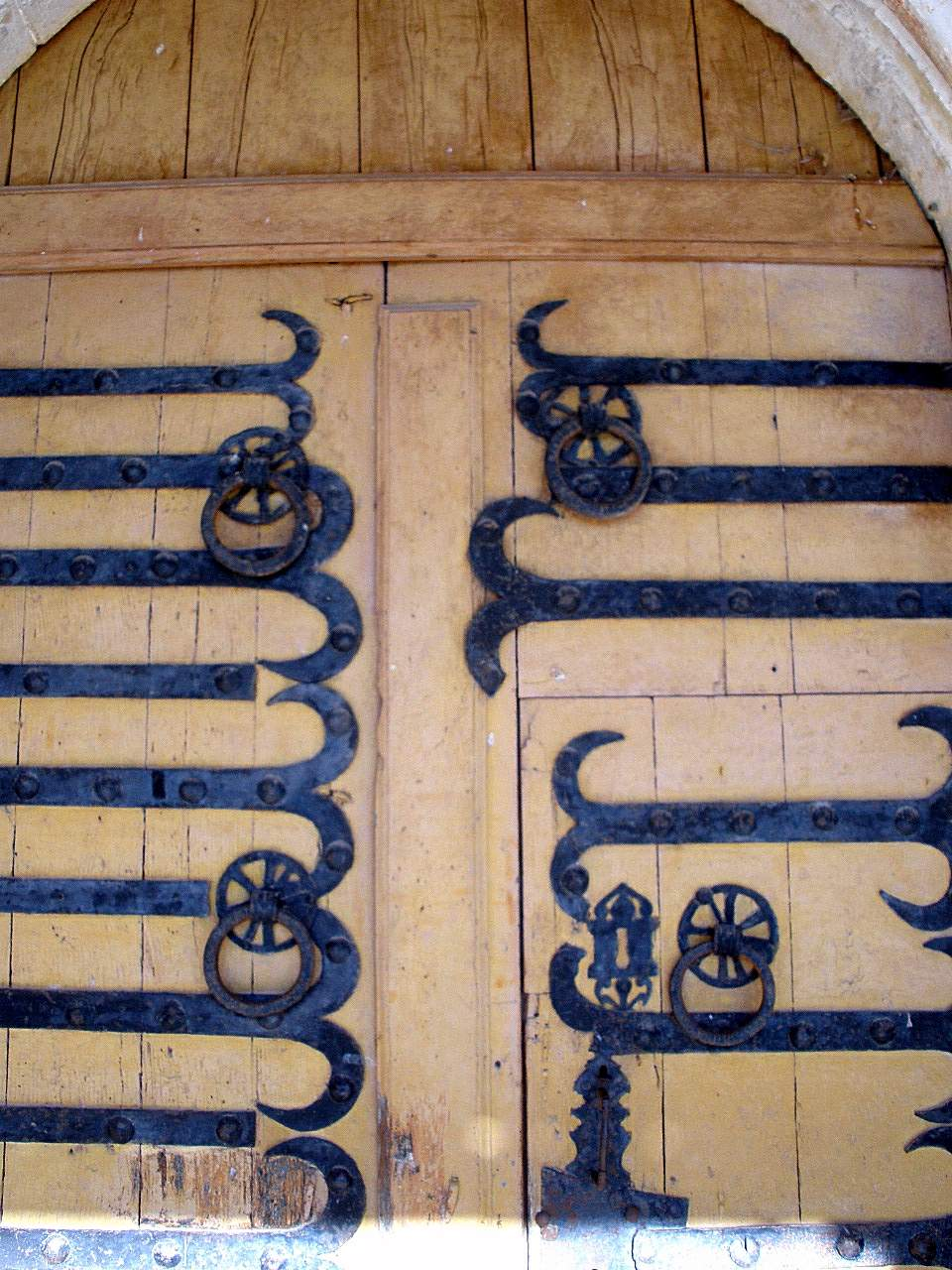 Iglesia de la Asunción, Ordoñana (Álava)